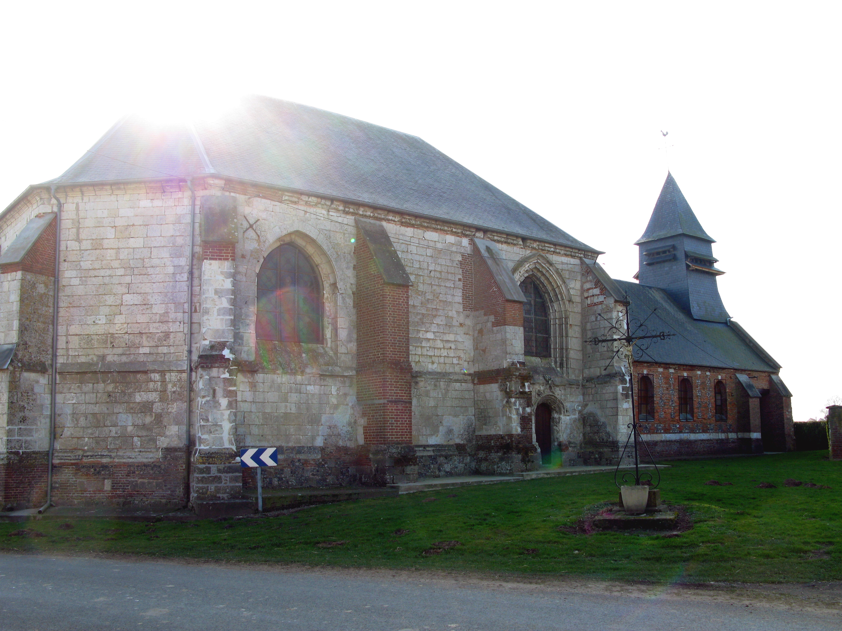 Caulières (Somme, France) - L'église et le calvaire. . .